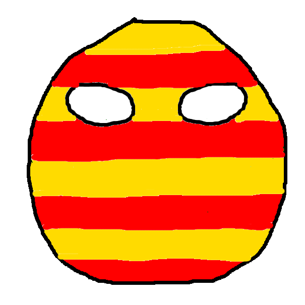 Catalanball